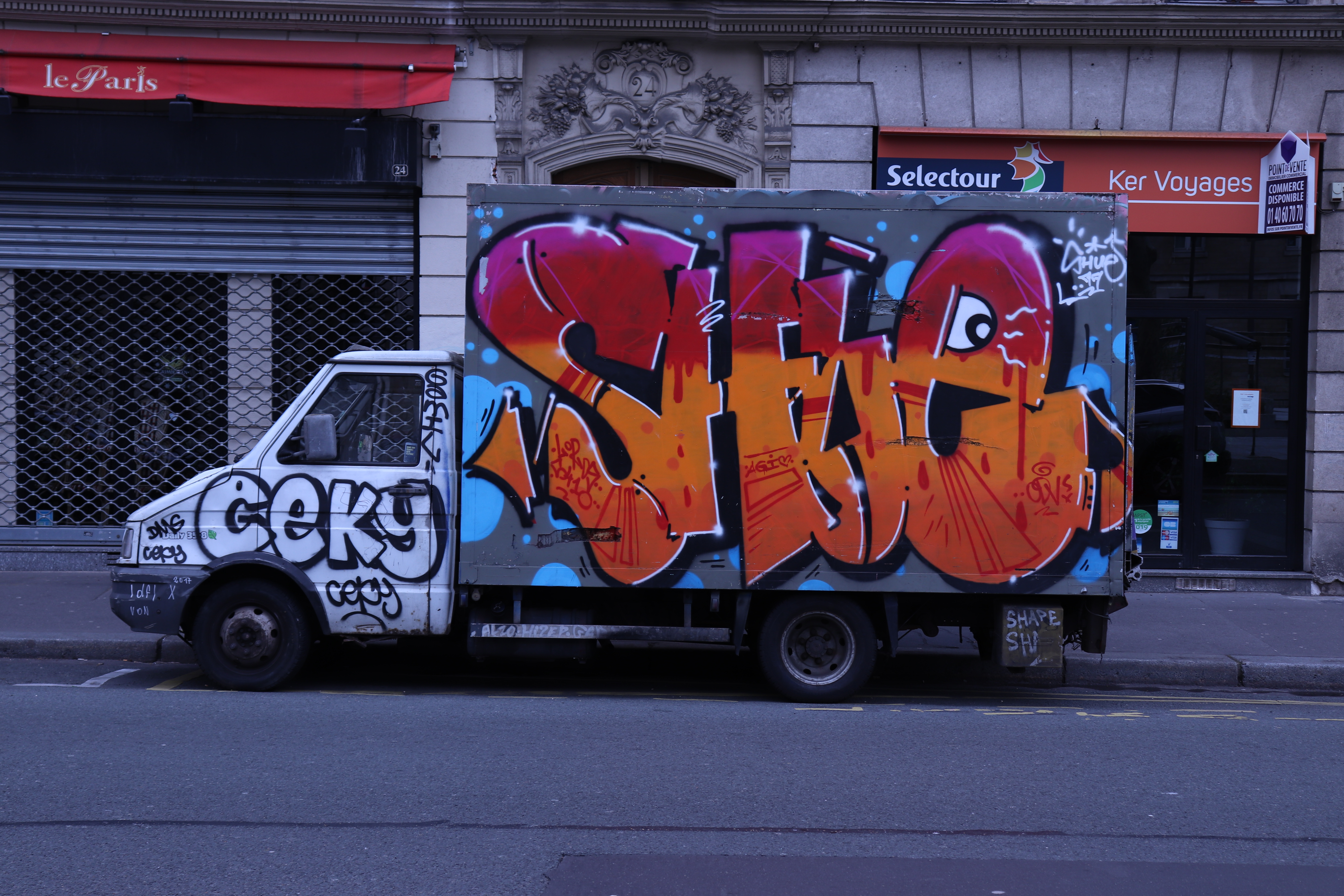 SKE grafitigilearen sinadura Parisko kamioi batean.